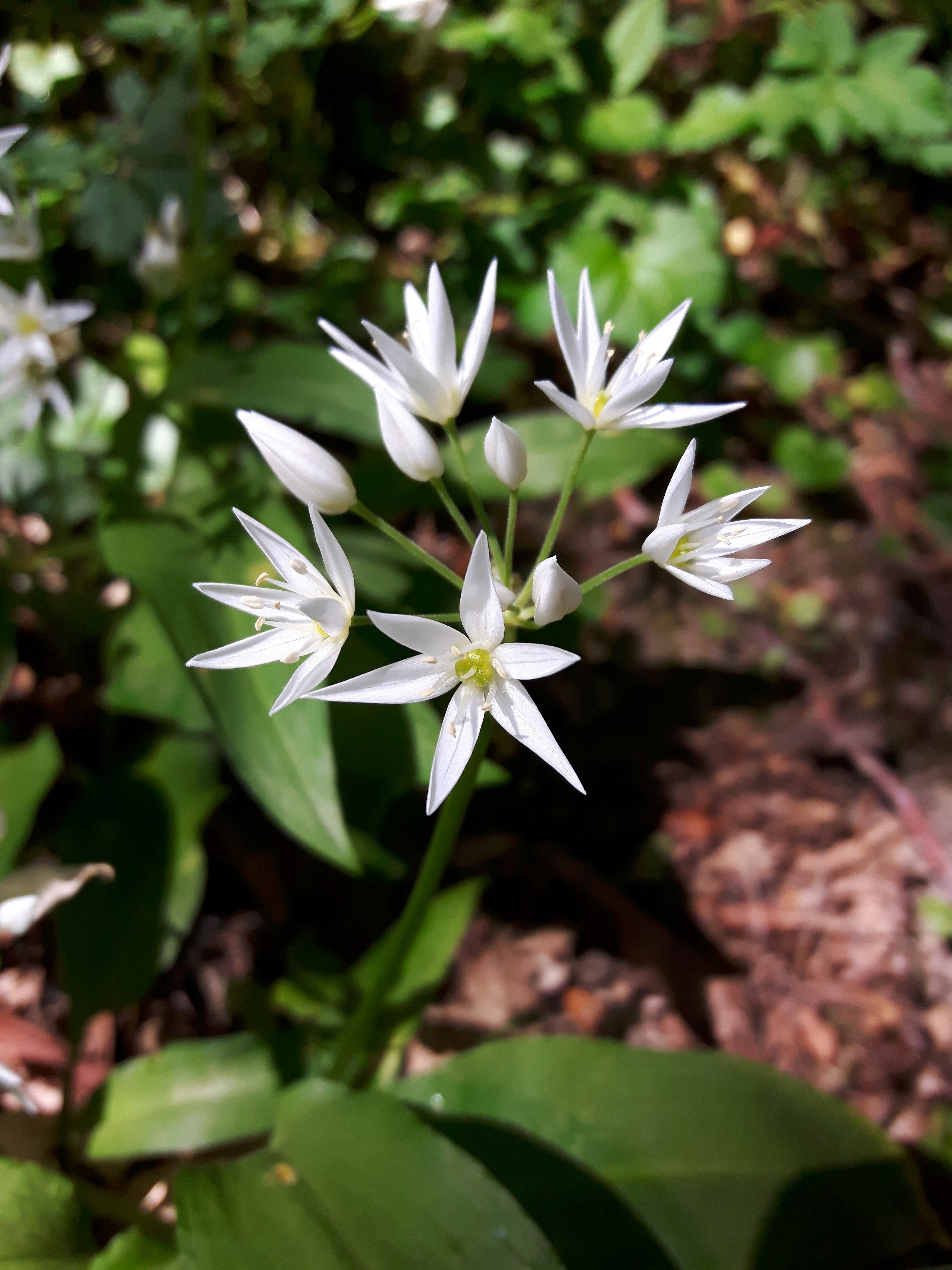 Bärlauch (Allium ursinum) - Blüte, an der Latrop im Naturschutzgebiet Waldreservat Schanze nördliche Teilfäche